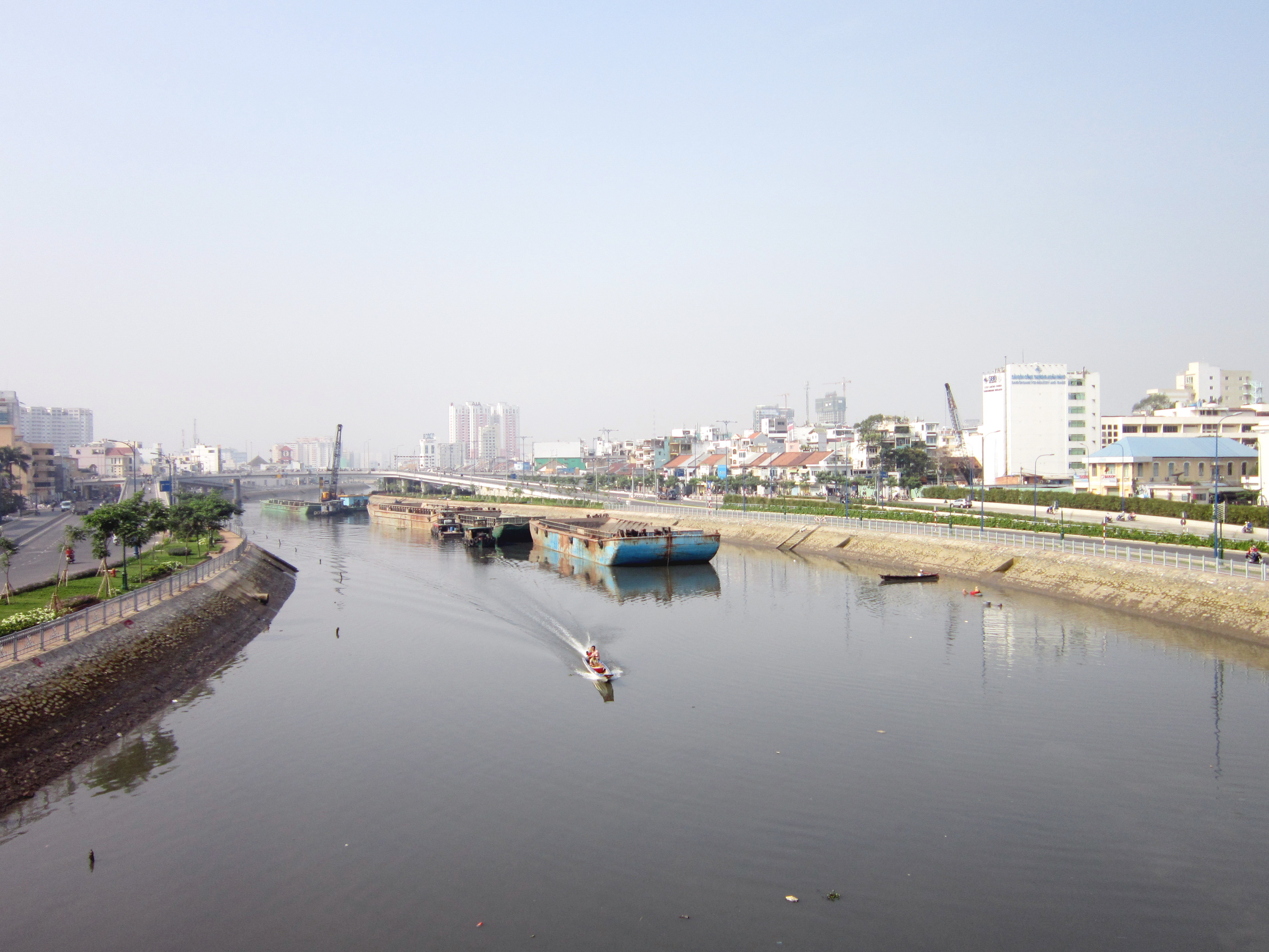 Rạch Bến Nghé, đoạn chảy qua cầu Khánh Hội, thuộc quận 4, Thành phố Hồ Chí Minh, Việt Nam.